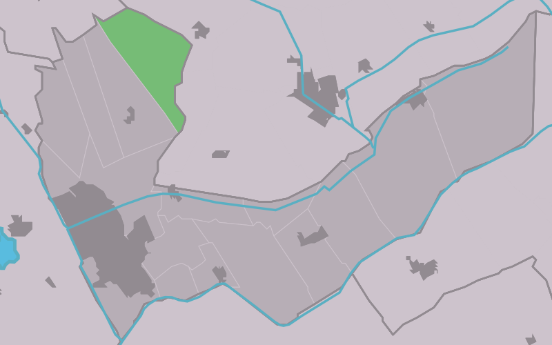 Kaartsje fan himrik fan Gersleat